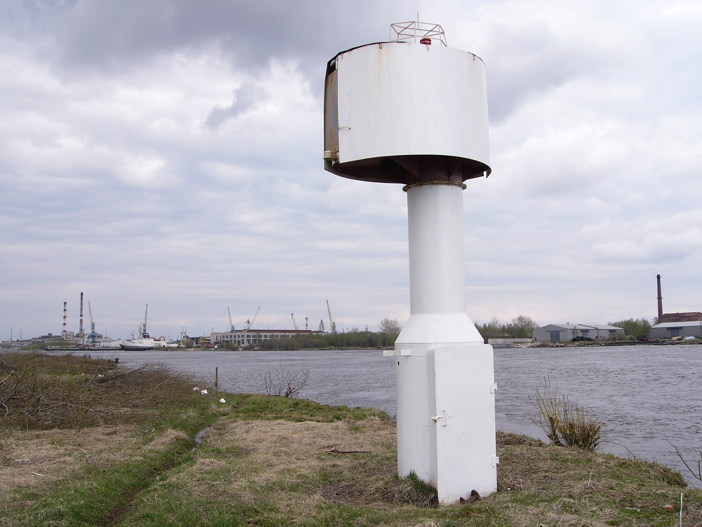 Маяк на берегу Маймаксы